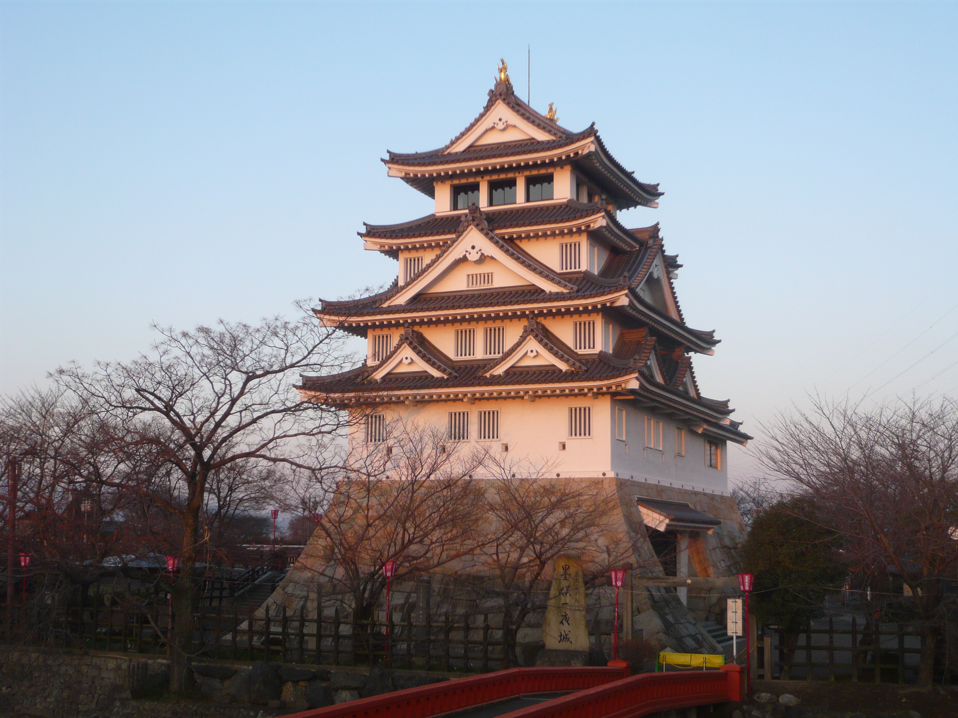 Sunomata Castle（墨俣城, Ogaki, Gifu, Japan (岐阜県大垣市）で撮影。